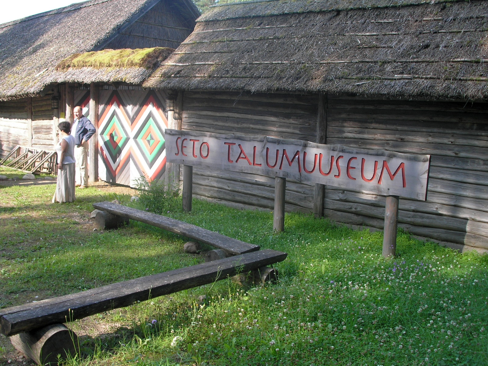 Seto Talumuuseumi värav, 8. juuli 2013.